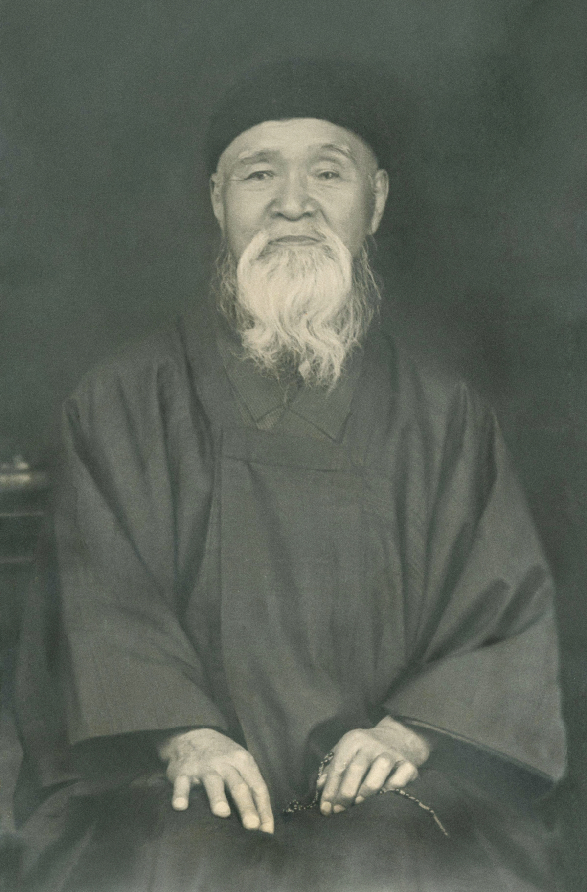 晩年の高木甚三郎